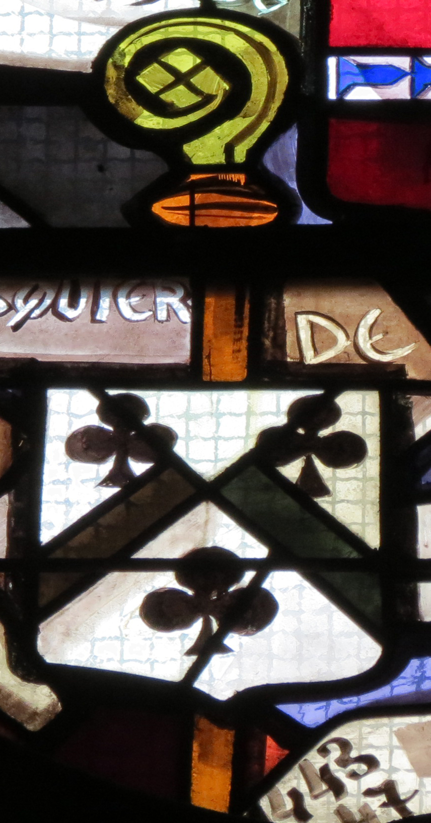 Blason de Pasquier de Vaux, évêque de Lisieux (1443-1447).